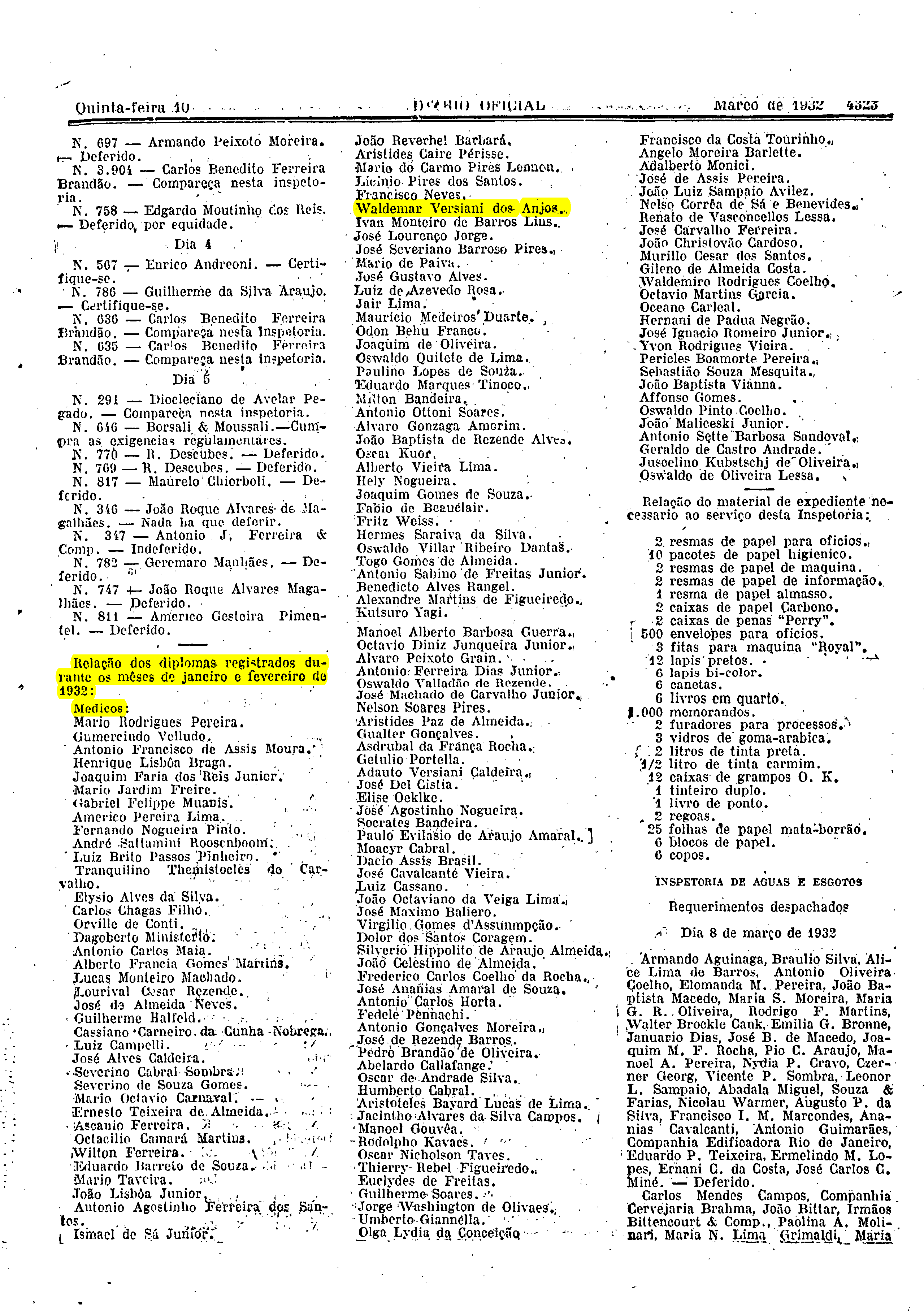 Página 11 da Seção do Diário Oficial da União (Brasil) do dia 10 de março de 1932